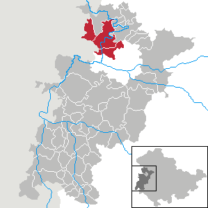 Verwaltungsgemeinschaft Creuzburg in Thuringia - Wartburgkreis